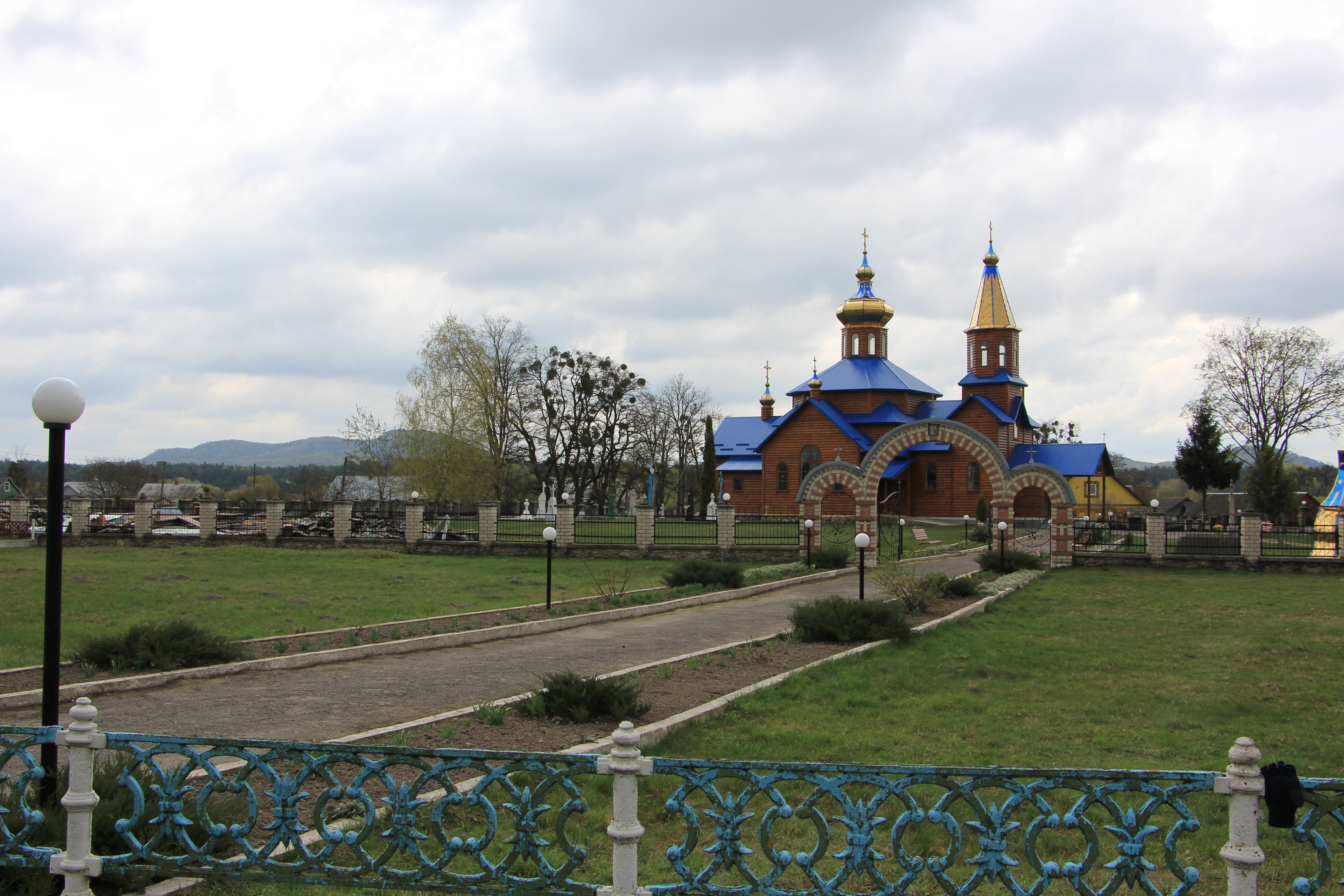 Дерев'яна церква в селі Великі Бережці Кременецького району, Тернопільської області